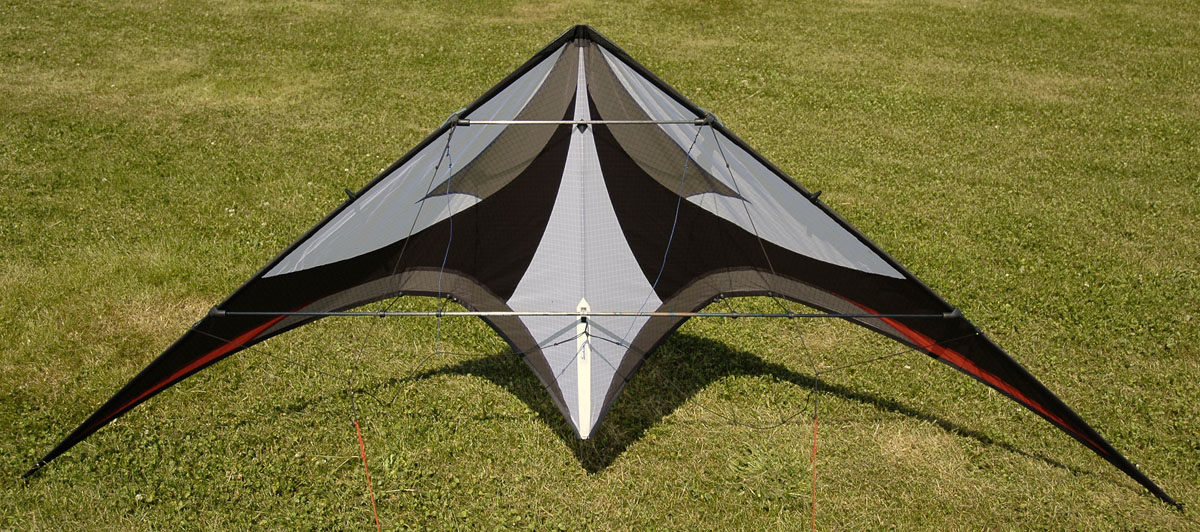 Soyokage Akuji Comp. Auteur: Wilfried Kopp